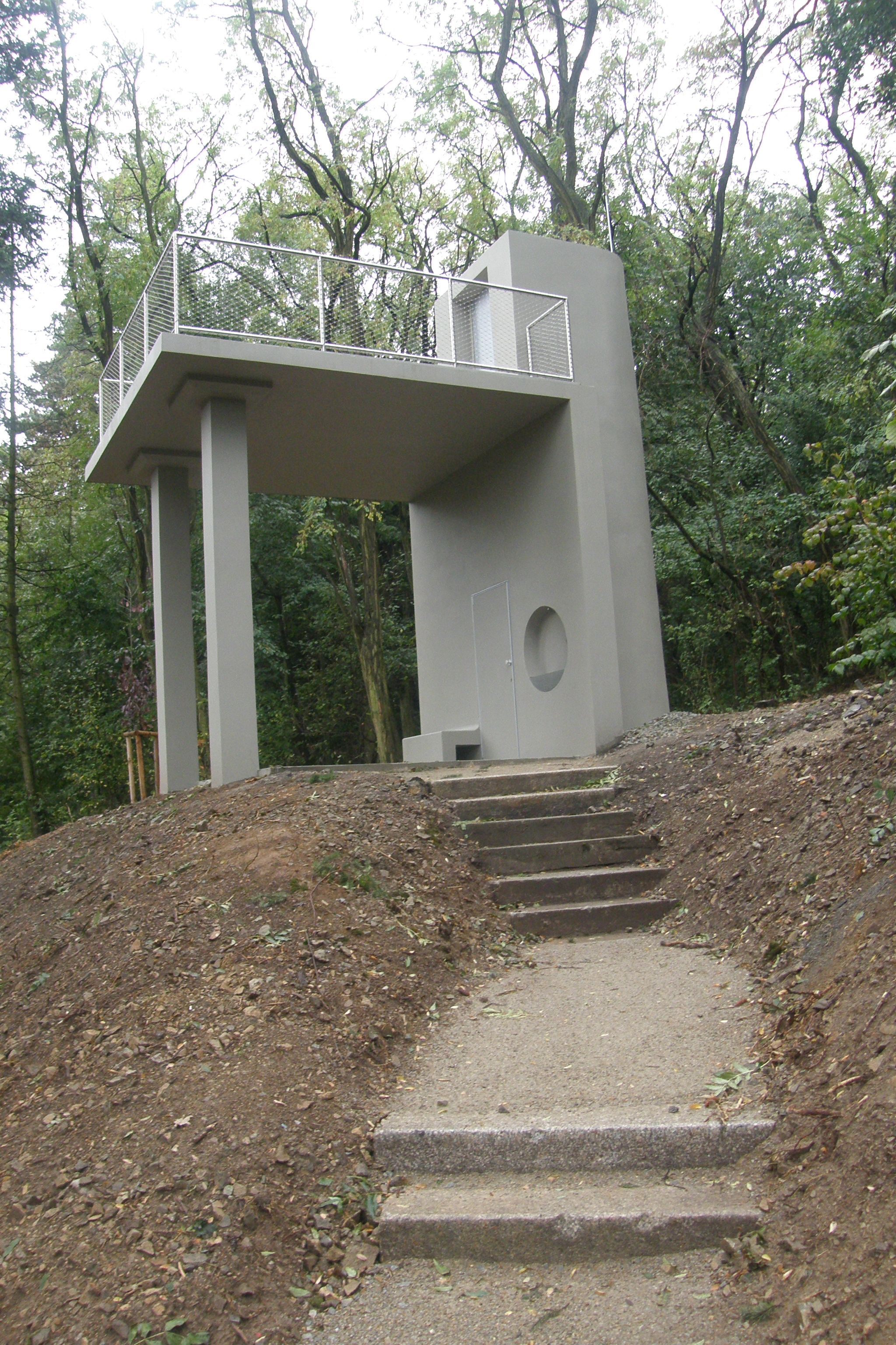 Lesopark Novy Liskovec, rozhledna Kamenný vrch